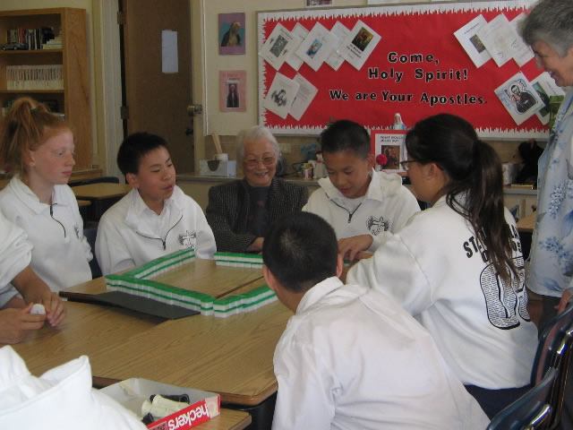 Ученици учат Маа Джонг